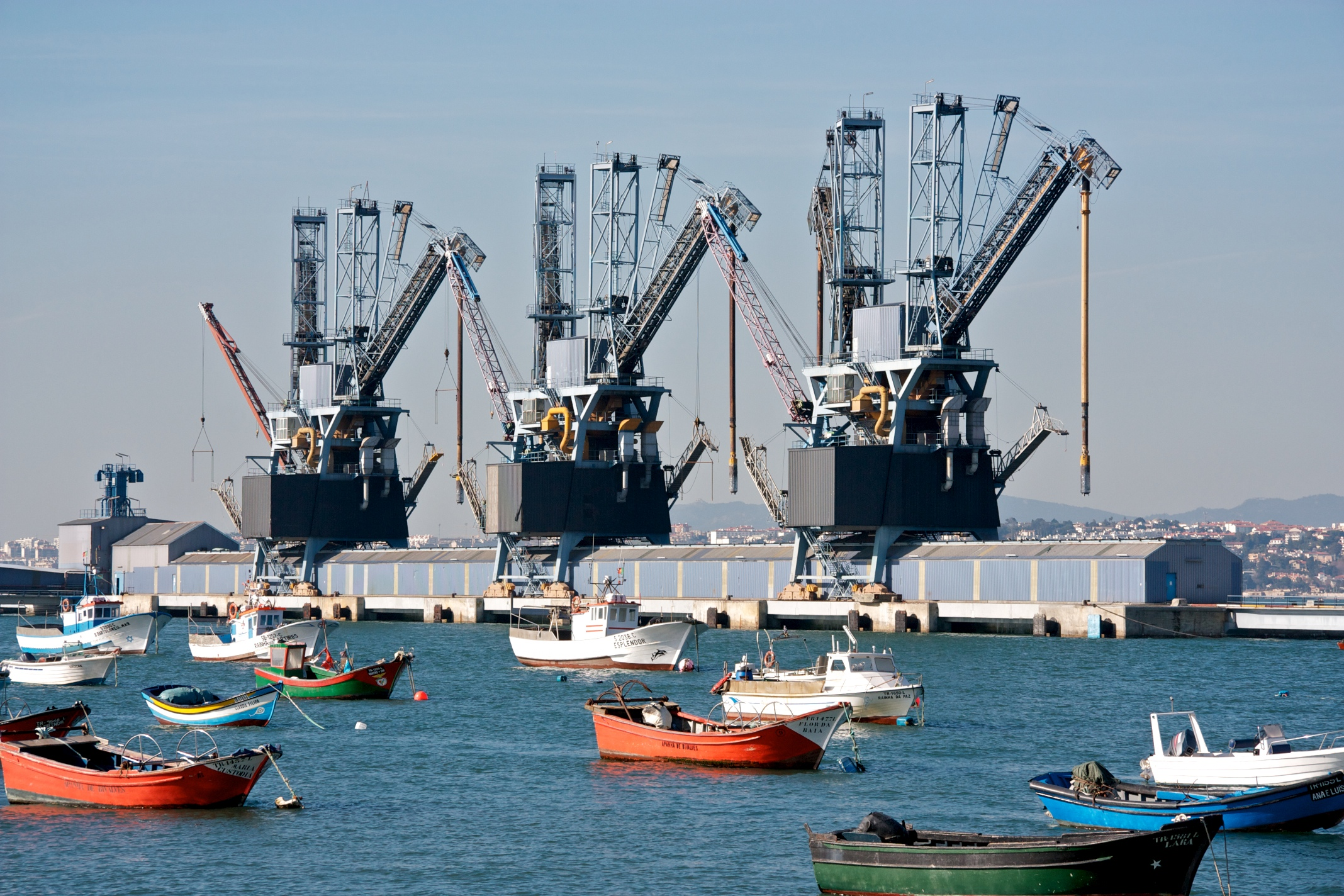 Silo internacional de águas profundas do Terminal da Trafaria.